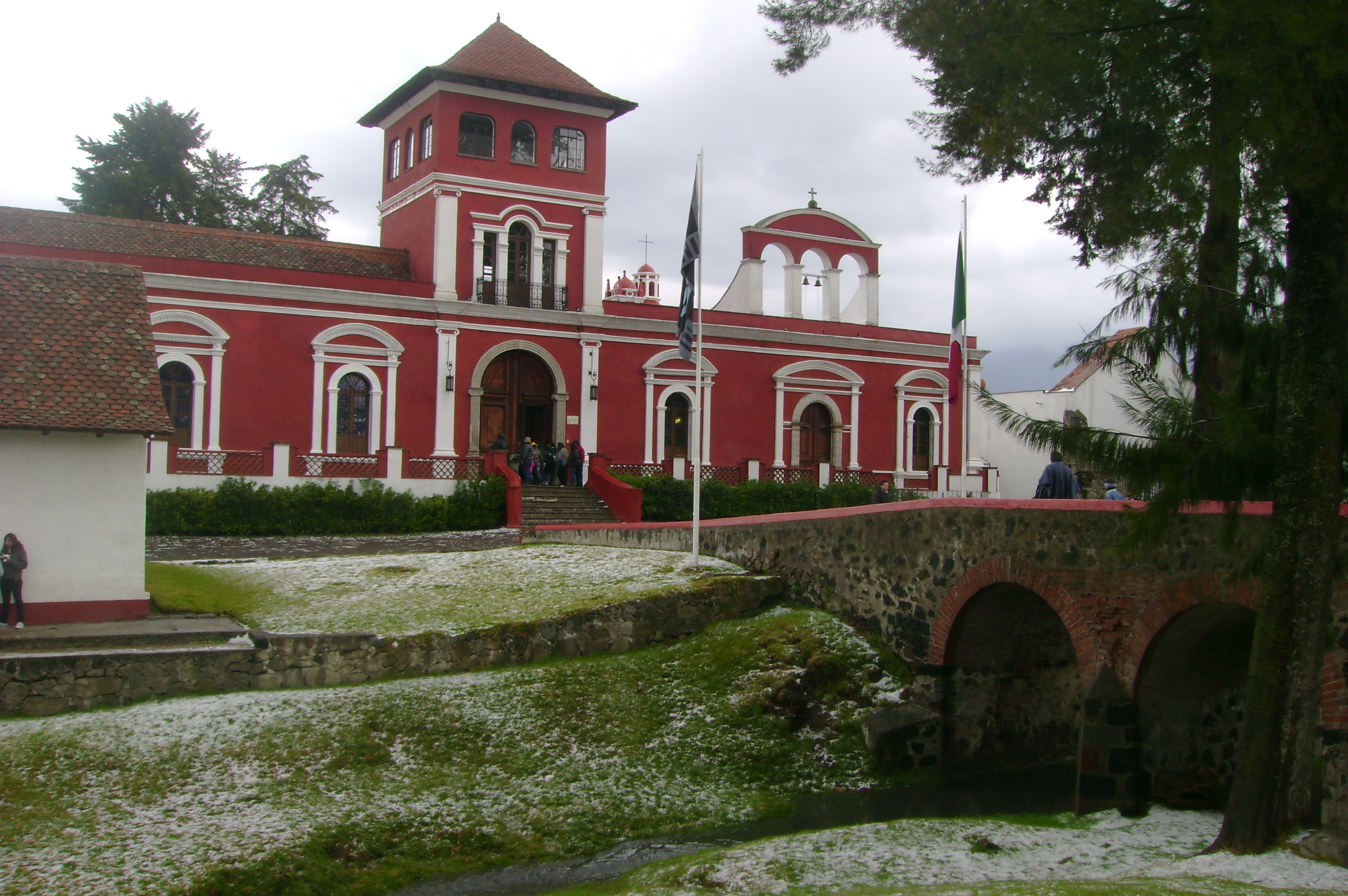 Frontispicio de la hacienda de Panoaya, en Amecameca, Estado de México, que perteneció al abuelo de Sor Juana Inés de la Cruz.